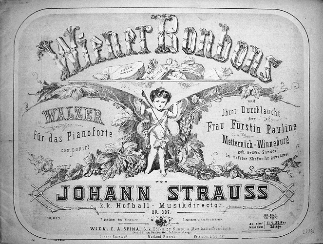 Portada de partitura del vals Wienner Bonbons, version para piano